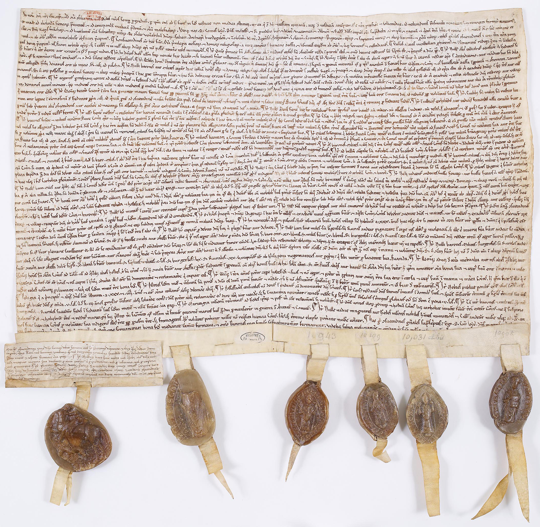 Coutumes de l’Albigeois. Pamiers, 1er décembre 1212.